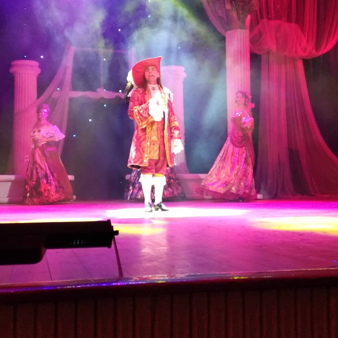 Уривок вистави "Король и шут"